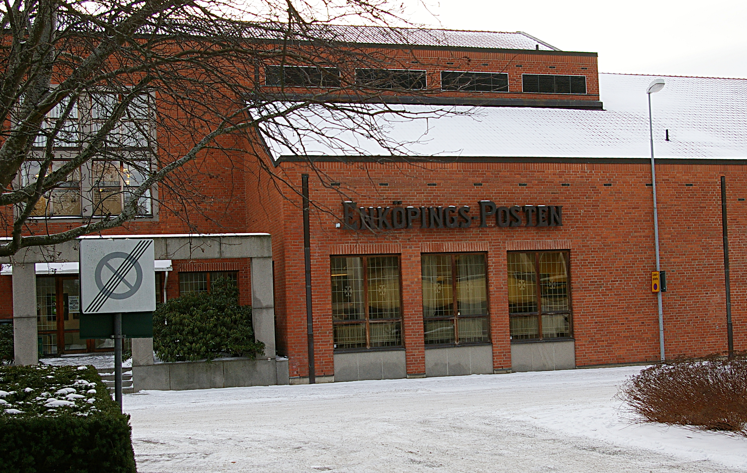 Enköpingspostens redaktion, Enköping.